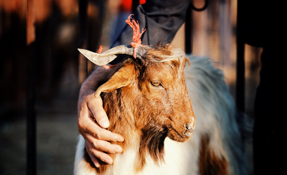 یک گوسفند پشت واگن